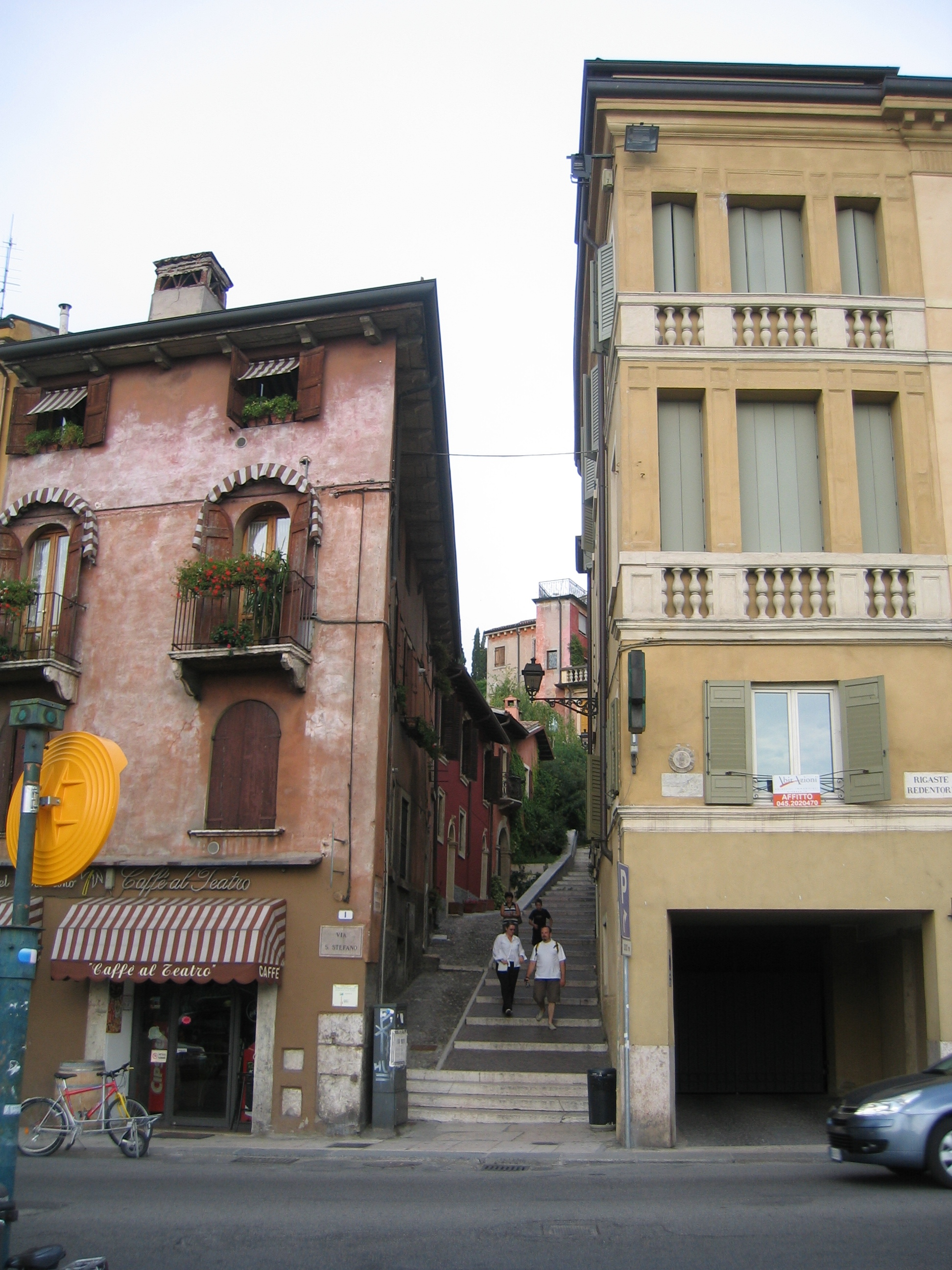 L'inizio della strada che porta sul colle ove sorge Castel San Pietro (Verona)